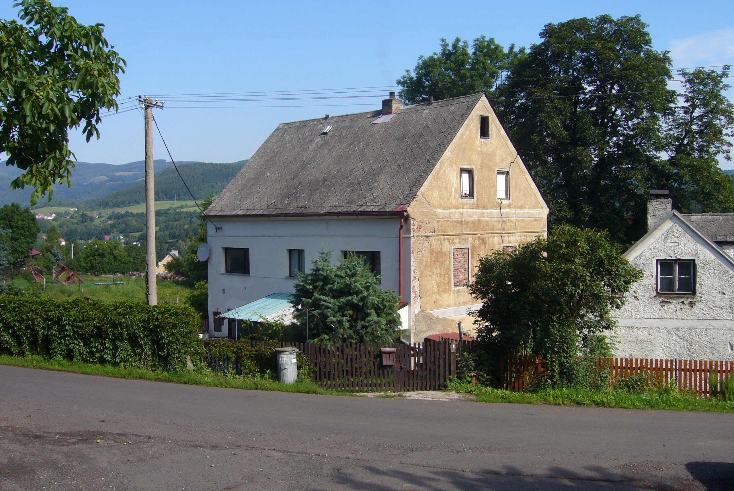 Oslovice - dům čp. 9